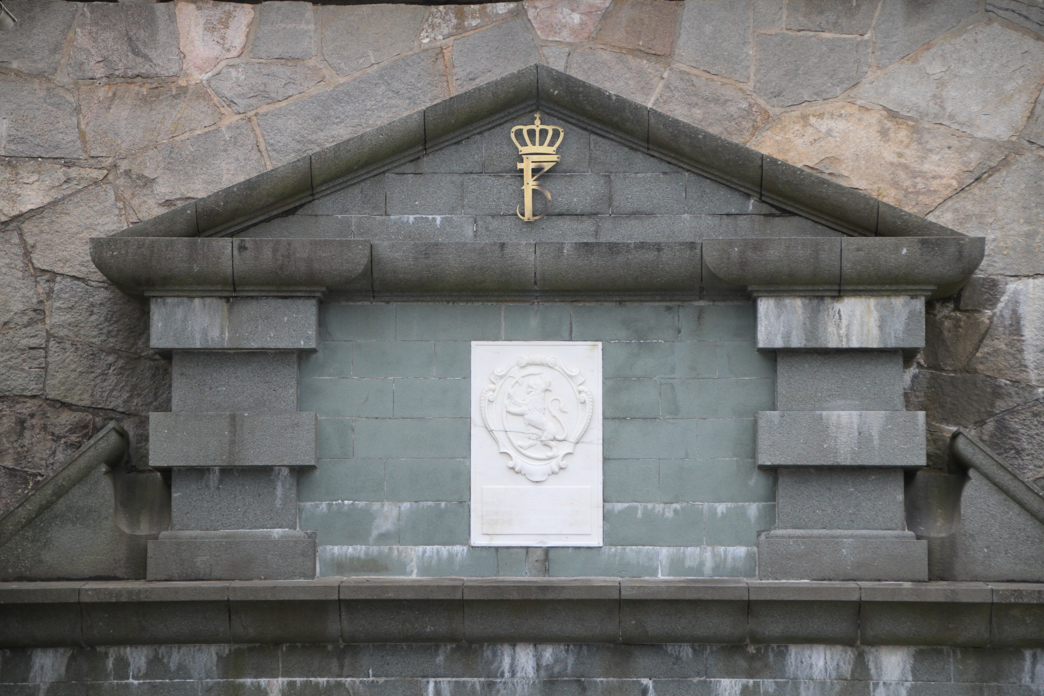 Fredriksten fortress in the city of Halden (Østfold), southeastern Norway